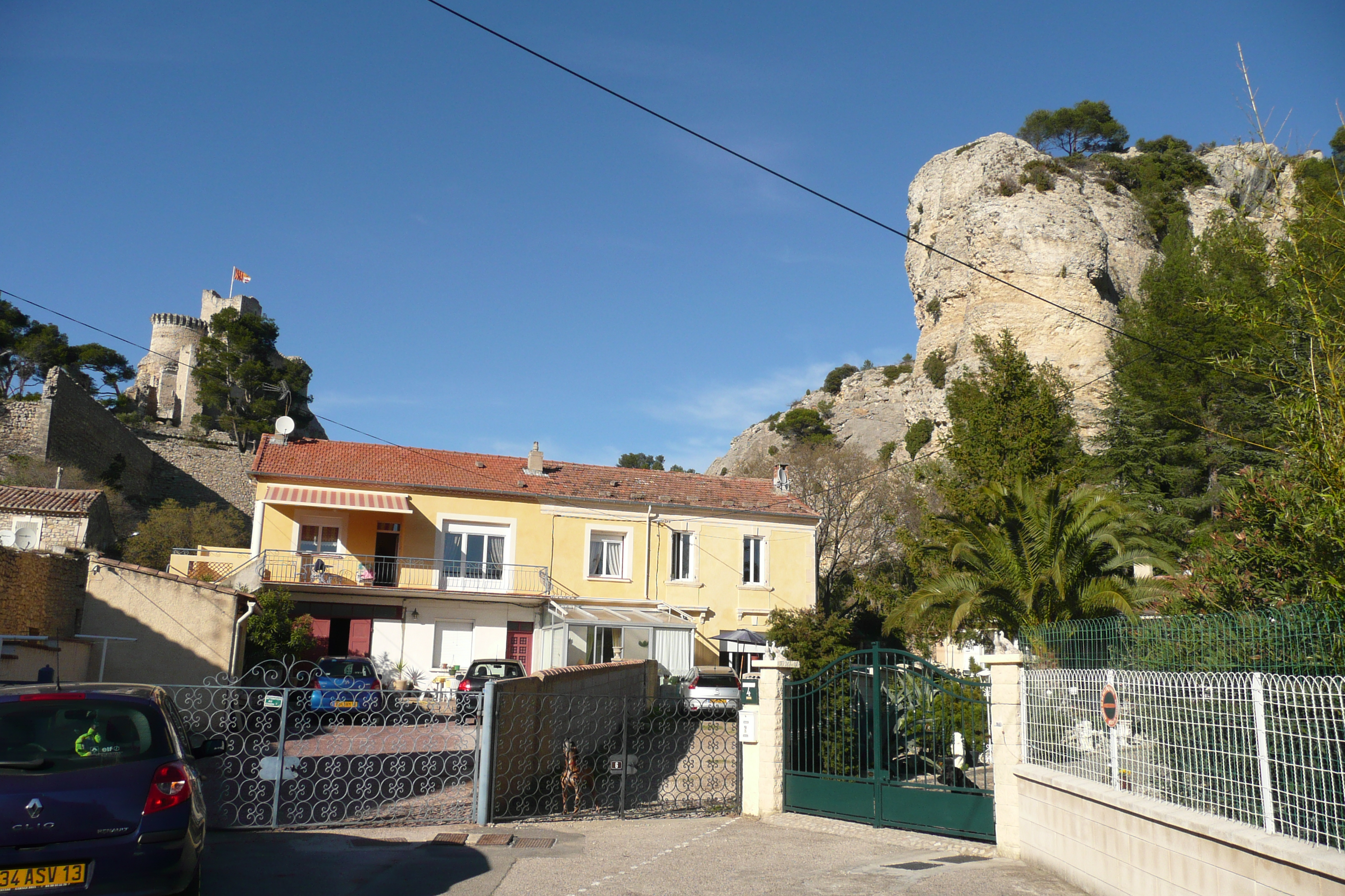 Boulbon.